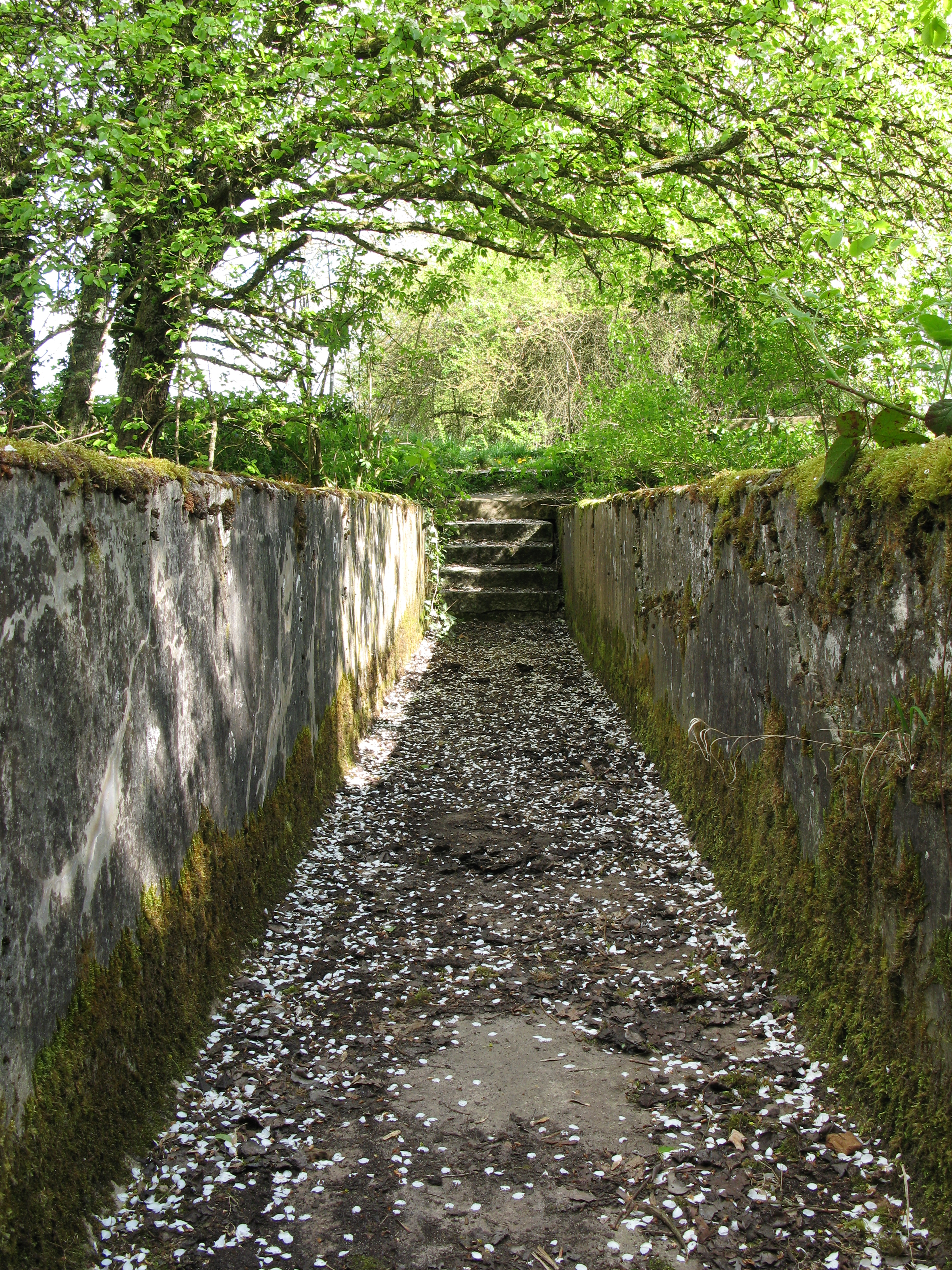 Ehemaliger Bewässerunggraben eines Rieselfeldes im Naturschutzgebiet Freiburger Rieselfeld im Stadtkreis Freiburg im Breisgau in Baden-Württemberg.